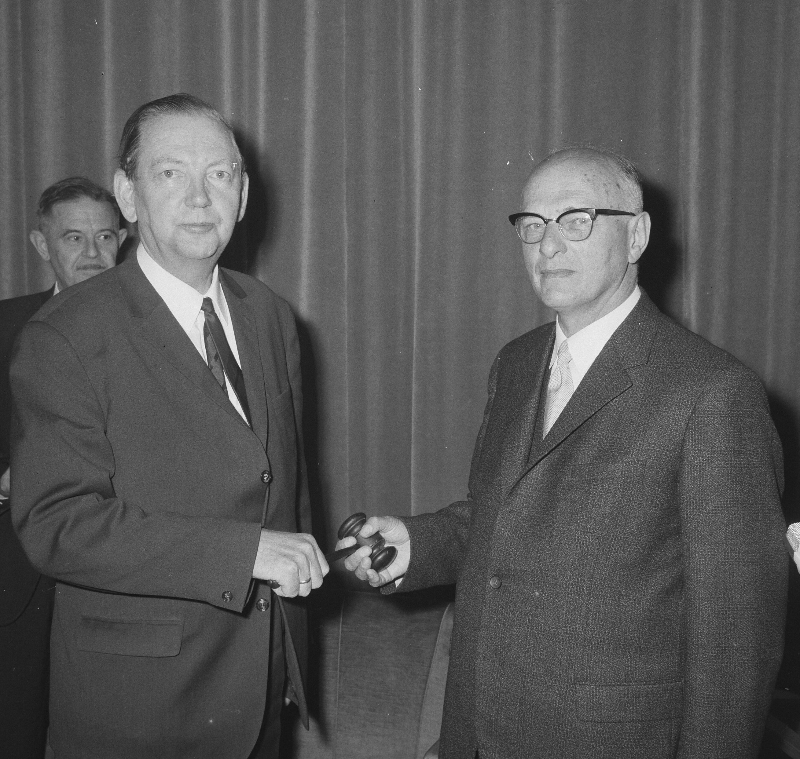 Collectie / Archief : Fotocollectie Anefo Reportage / Serie : [ onbekend ] Beschrijving : Nieuwe voorzitter NCRV te Utrecht geinstalleerd, links mr. dr. J. Ozinga , rechts prof. Van Itterson. Achter hen penningmeester G.A. Kieft Datum : 24 juni 1966 Locatie : Utrecht (stad) Trefwoorden : omroeporganisaties Persoonsnaam : Itterson, G. van, Kieft, G.A., Ozinga, J. Instellingsnaam : NCRV Fotograaf : Nijs, Jac. de / Anefo Auteursrechthebbende : Nationaal Archief Materiaalsoort : Negatief (zwart/wit) Nummer archiefinventaris : bekijk toegang 2.24.01.03 Bestanddeelnummer : 919-2848